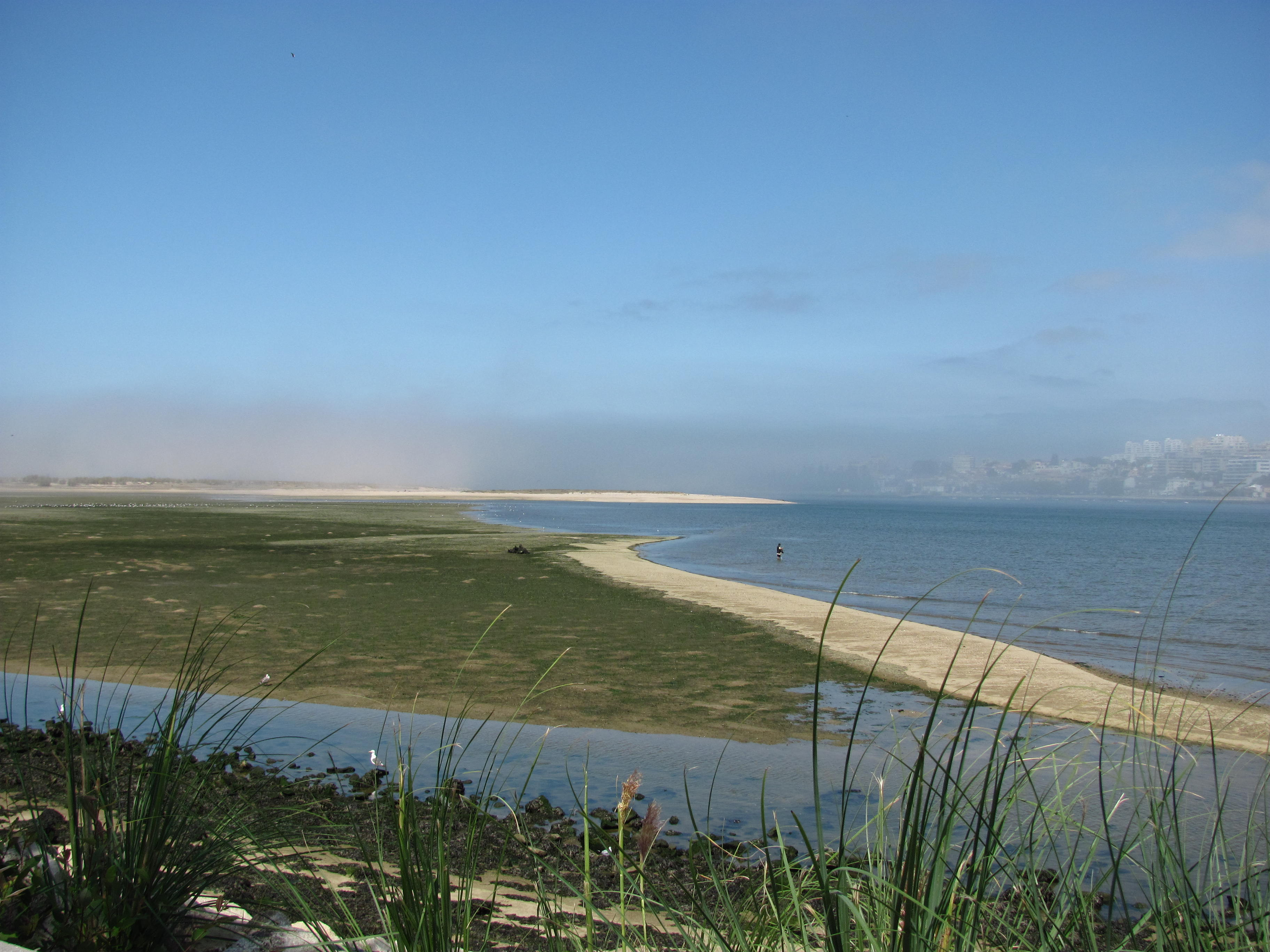 ref IMG 4166